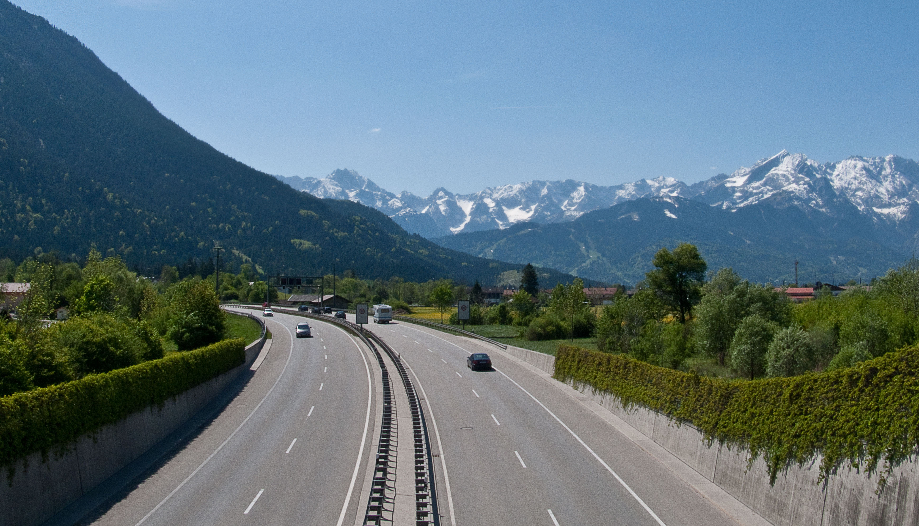 Die Umgehungsstraße (B2) im Norden von Farchant mit Blick nach Süden auf das Wettersteingebirge. Links die Dreitorspitzen, daneben der Teufelsgrat von der Scharnitzspitze bis zum Hinterreintalschrofen. Das auffällige Dreieck rechts ist die Alpspitze, rechts daneben ein Teil des Höllentalgrats.